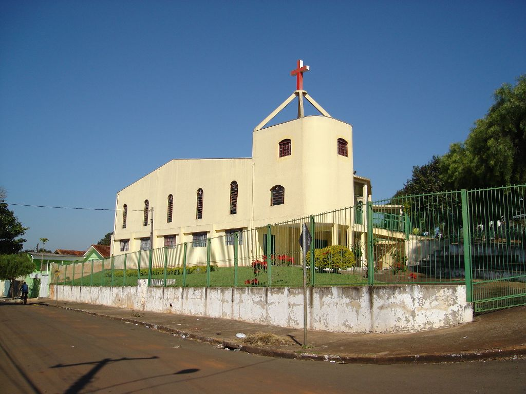 Capela Bom Jesus, Conjunto Avelino Antônio Vieira, Londrina-PR